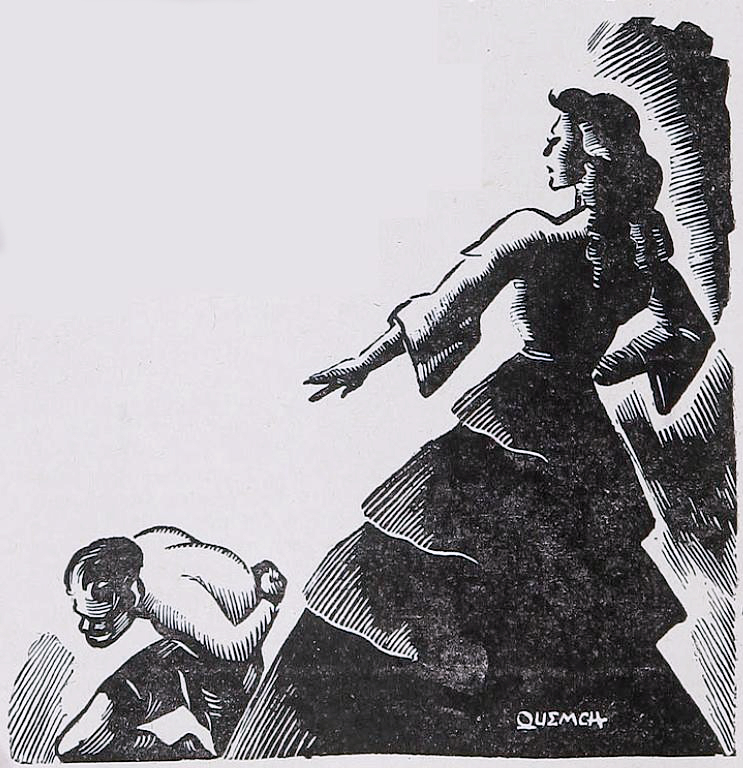 Catalina de los Ríos y Lisperguer, más conocida como La Quintrala (Santiago, 1604-ibídem, 16 de enero de 1665), fue una aristócrata y terrateniente chilena de la época colonial, famosa por su belleza y la crueldad con la que trataba a sus sirvientes. Se convirtió en un ícono del abuso y la opresión coloniales. Su figura, fuertemente mitificada, pervive en la cultura popular de Chile como el epítome de la mujer perversa y abusadora.